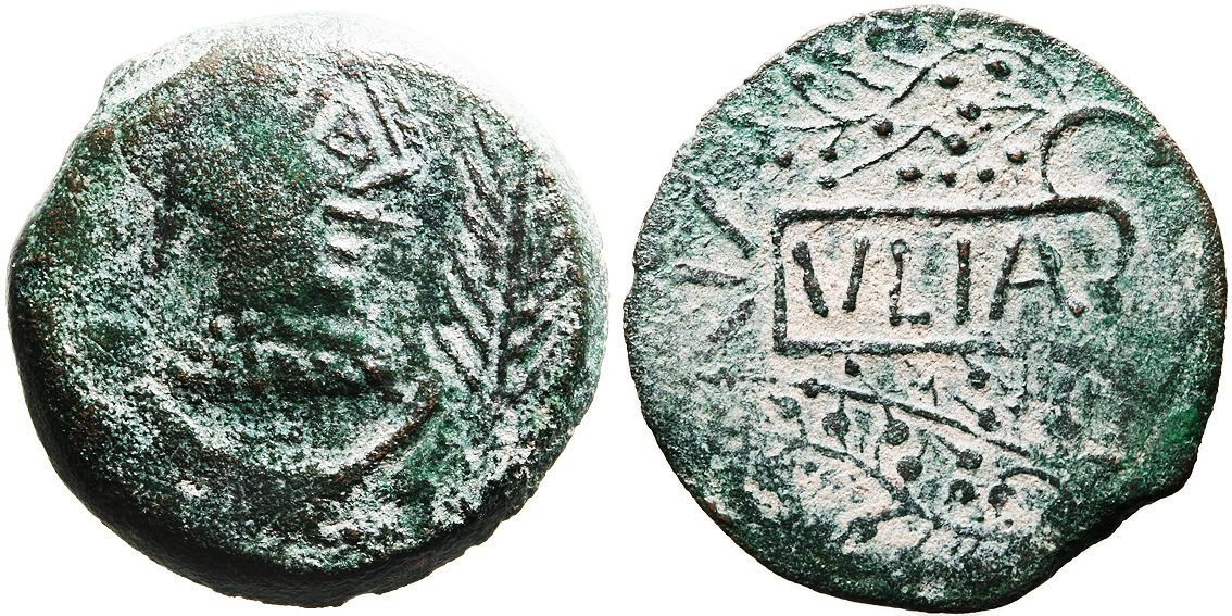 As de bronce acuñado en Ulia, cerca de la actual Montemayor (provincia de Córdoba, España). En el anverso muestra una cabeza humana, una palma y un creciente; en el reverso unas ramas de vid y la leyenda "VLIA".